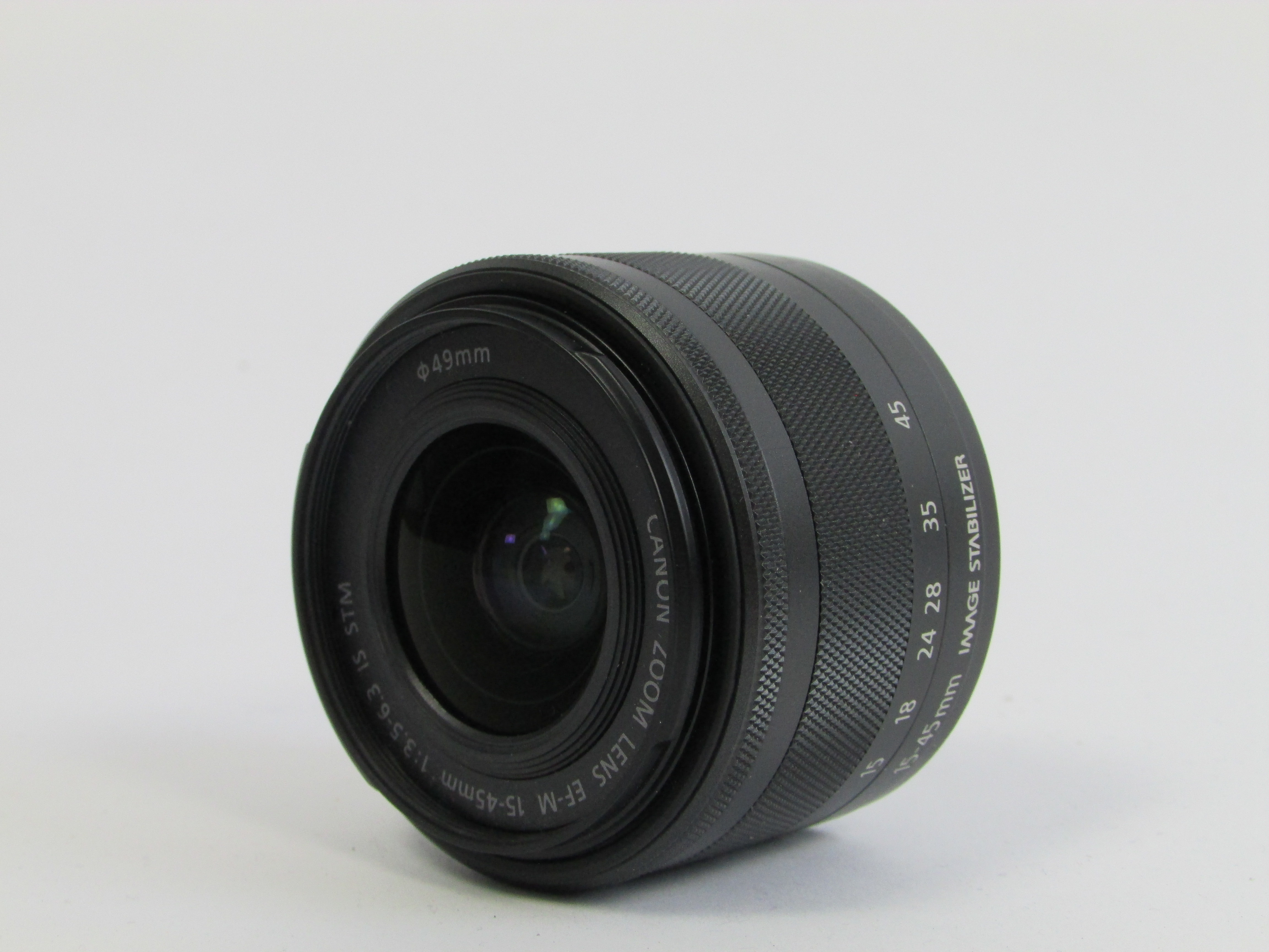 Das Canon EF-M 15-45mm f/3.5-6.3 IS STM ist ein Kit-Objektiv für Systemkameras mit EF-M-Bajonett.